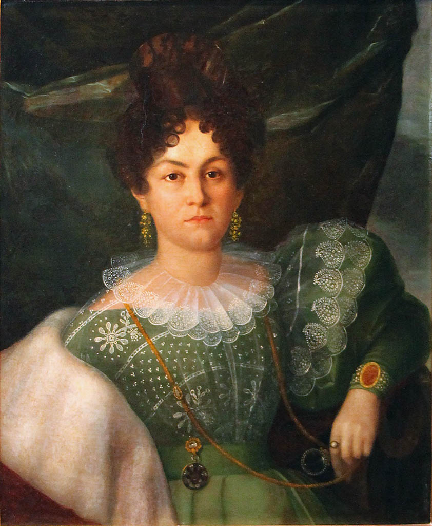 Анна Борисовна Бакунина, ур. Зеленская (1802-1835). Внебрачная дочь князя Б.В.Голицына, жена Александра Павловича Бакунина, соученика и друга Пушкина.